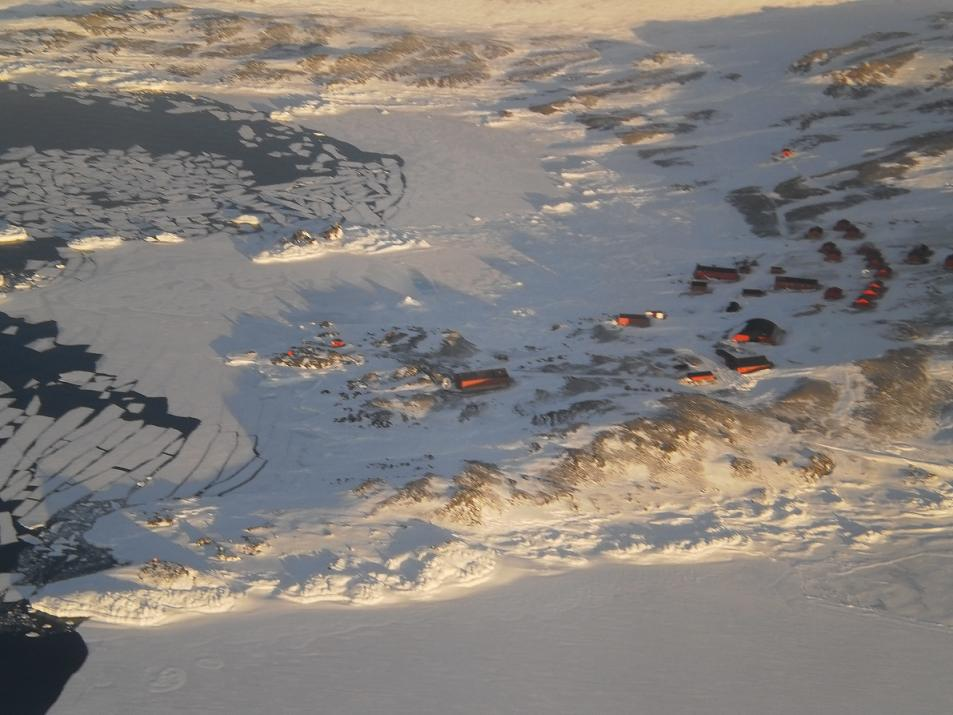 En el Día del Estudiante, alumnos y docentes de la Antártida Argentina recibieron por primera vez las netbooks de Conectar Igualdad. El responsable de una de las delegaciones de ANSES en Tierra del Fuego, Juan Carlos Arcando, viajó junto a representantes del Ministerio del Interior y la Fuerza Aérea Argentina a Base Esperanza para entregar 14 computadoras portátiles a la Escuela Provincial Nº 38, la única de la Antártida. Sobre esta entrega, el titular de ANSES, Diego Bossio, sostuvo: “Un Estado inclusivo es aquel que llega a cada uno de los ciudadanos de su territorio. Por eso con Conectar Igualdad también nos acercamos a la única escuela de la Antártida, para que esos chicos también tengan acceso a una mejor educación”. Base Esperanza es una de las seis bases permanentes en la Antártida Argentina y está constituida por científicos, maestros de escuela, dotación del Ejército y Aeronáutica y sus respectivas familias, totalizando un promedio de 40 personas. Debido a las condiciones climáticas, la entrega de netbooks al personal docente debió realizarse en tan solo 10 minutos en la misma pista de aterrizaje sobre un glaciar, a 500 mts. de la Base. Hasta el momento, Conectar Igualdad entregó más de 1.200.000 netbooks a escuelas secundarias públicas, escuelas de educación especial e institutos de formación docente de todo el país. Para fin de año se estima llegar al 1.800.000 y como meta final a 3 millones de computadoras. El programa está cambiando la educación argentina, ya que favorece la inserción de los jóvenes y de sus familias en el conocimiento de las nuevas tecnologías, promoviendo valores tales como la integración e inclusión. Al mismo tiempo, esta medida busca recuperar y valorizar la escuela pública, garantía del derecho a la educación gratuita.